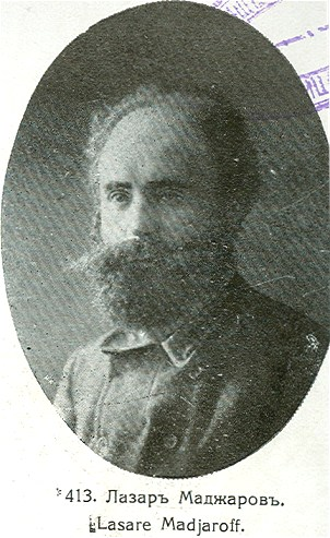 Лазар Маджаров.